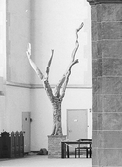 Man met vier handen (1974) door Koos van Bruggen